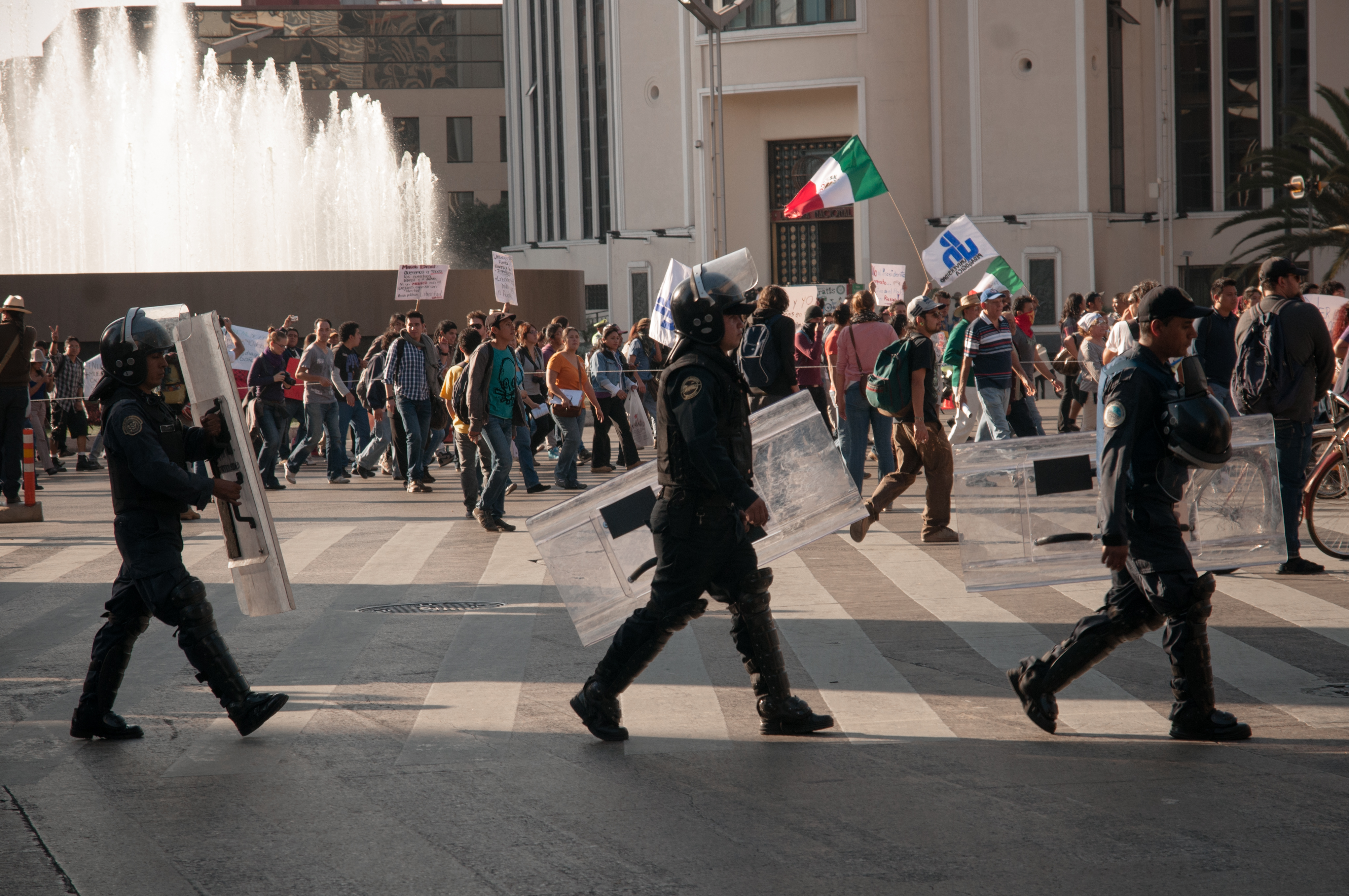 El Primero de Diciembre, la policía detuvo violenta e injustificademente a muchas de las personas que protestaban contra la imposición de Peña Nieto como presidente. Se les amenazó con condenas de cárcel que iban de 3 a 9 años de prisión. Ante tales ataques contra las garantías individuales y los derechos humanos, la sociedad civil marchó el día de hoy del Ángel al Zócalo para exigir la inmediata liberación de los compas presos con la consigna: ¡Protestar no es un delito! La marcha, que se desarrollo en absoluta paz, fue custodiada fuertemente por el cuerpo de granaderos del DF.